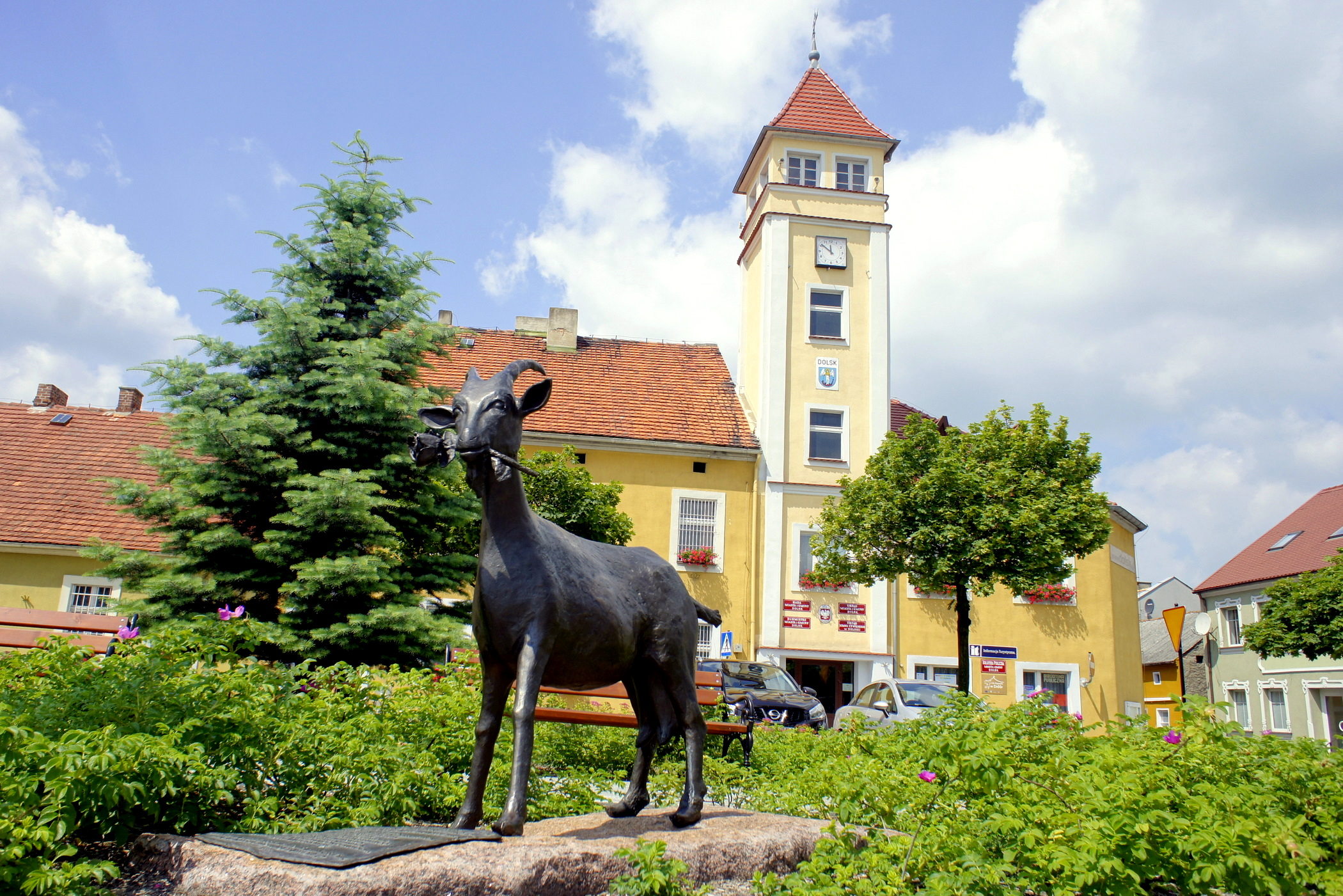 Dolsk, powiat śremski w Wielkopolsce. Rzeźba kozy z różą w pyszczku autorstwa Piotra Garstki ( odsłonięta we wrześniu 2010 r. )